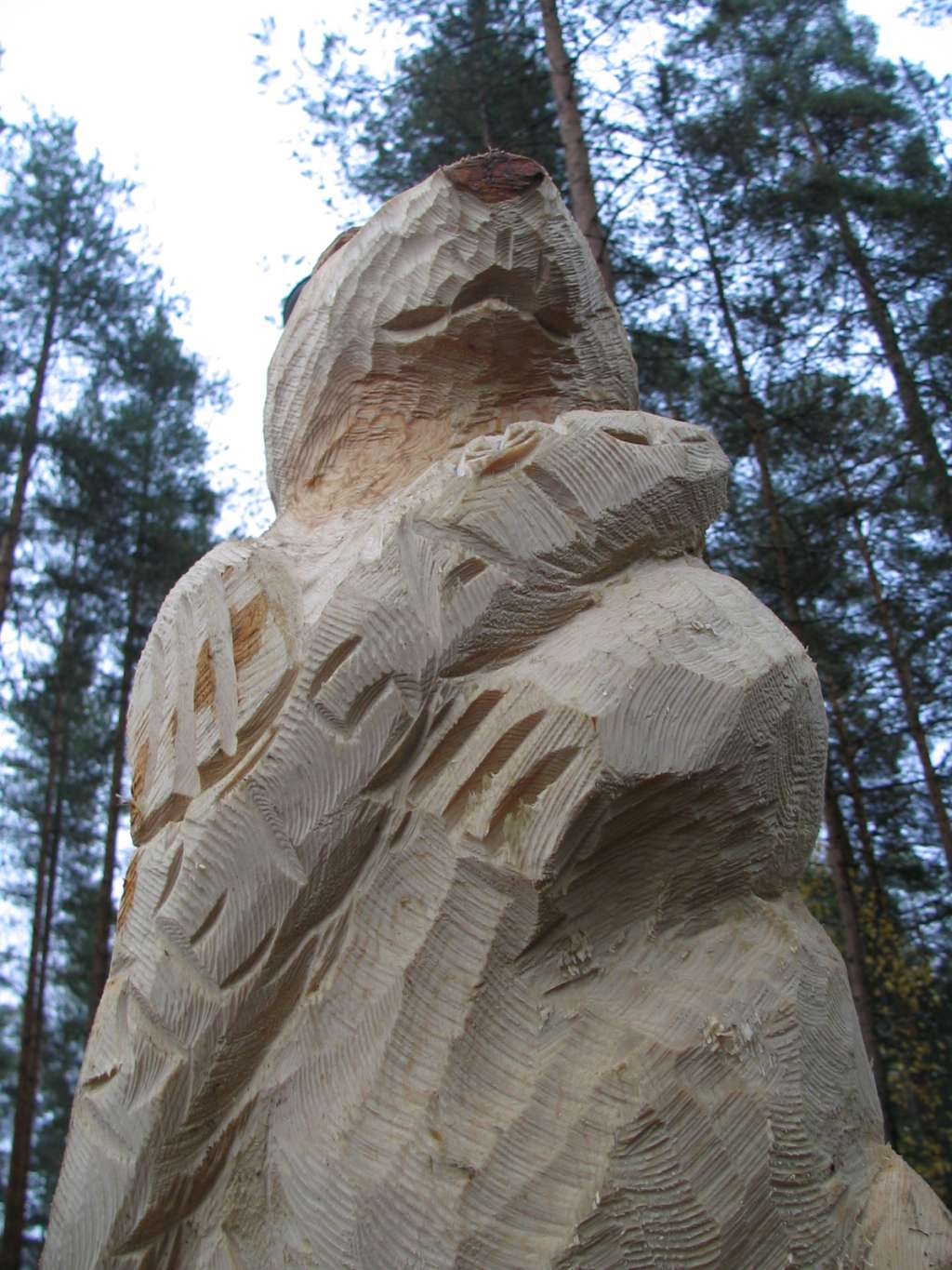 Beawer